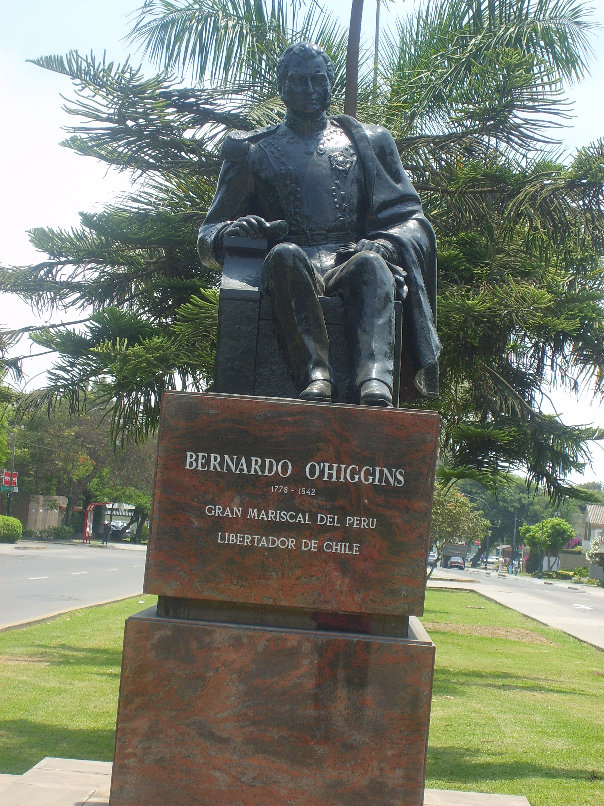 Monumento al Capitán General de Chile y Gran Mariscal del Perú Don Bernardo O'Higgins en la Avenida Javier Prado Este del barrio San Isidro, Lima, Perú. Fotografía obtenida por el Usuario Valo en la ciudad de Lima, el 3 de marzo de 2007